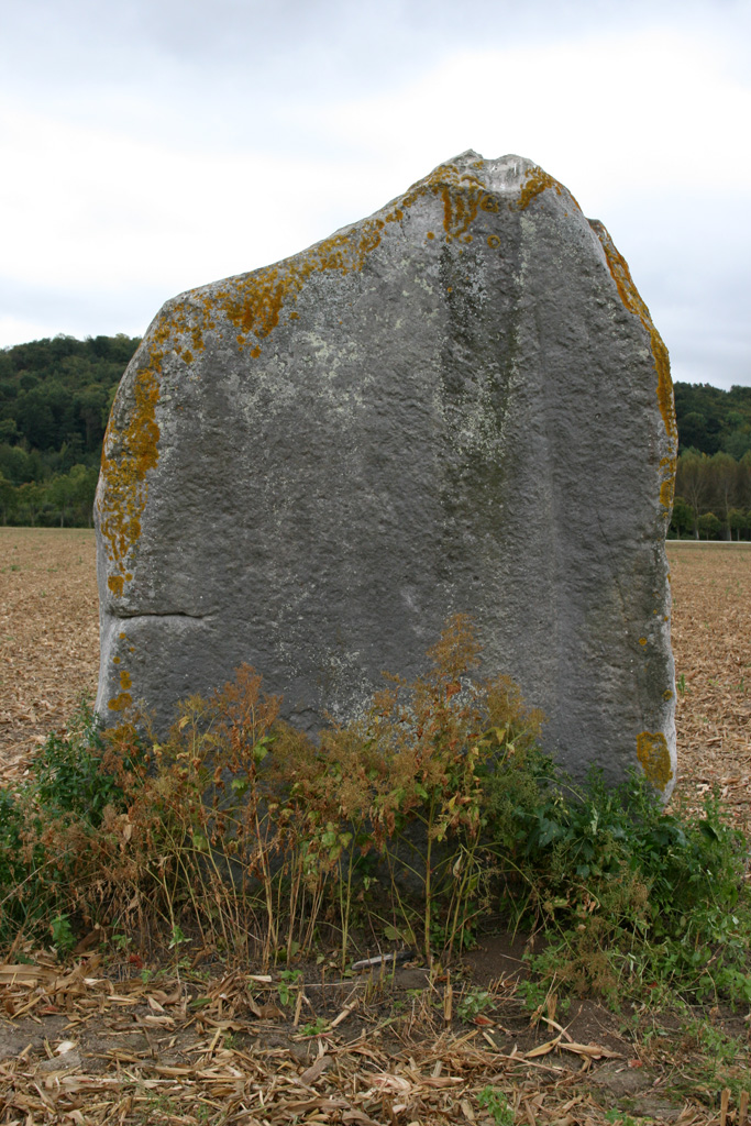 La Demoiselle de Rhuis, menhir situés sur le territoire de la commune de Rhuis (60) dans un champ non loin de la D 123.